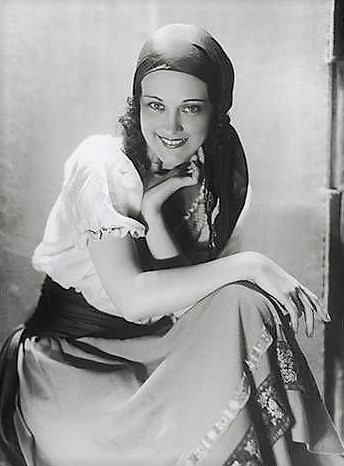 Lottice Howell, foto pubblicitaria